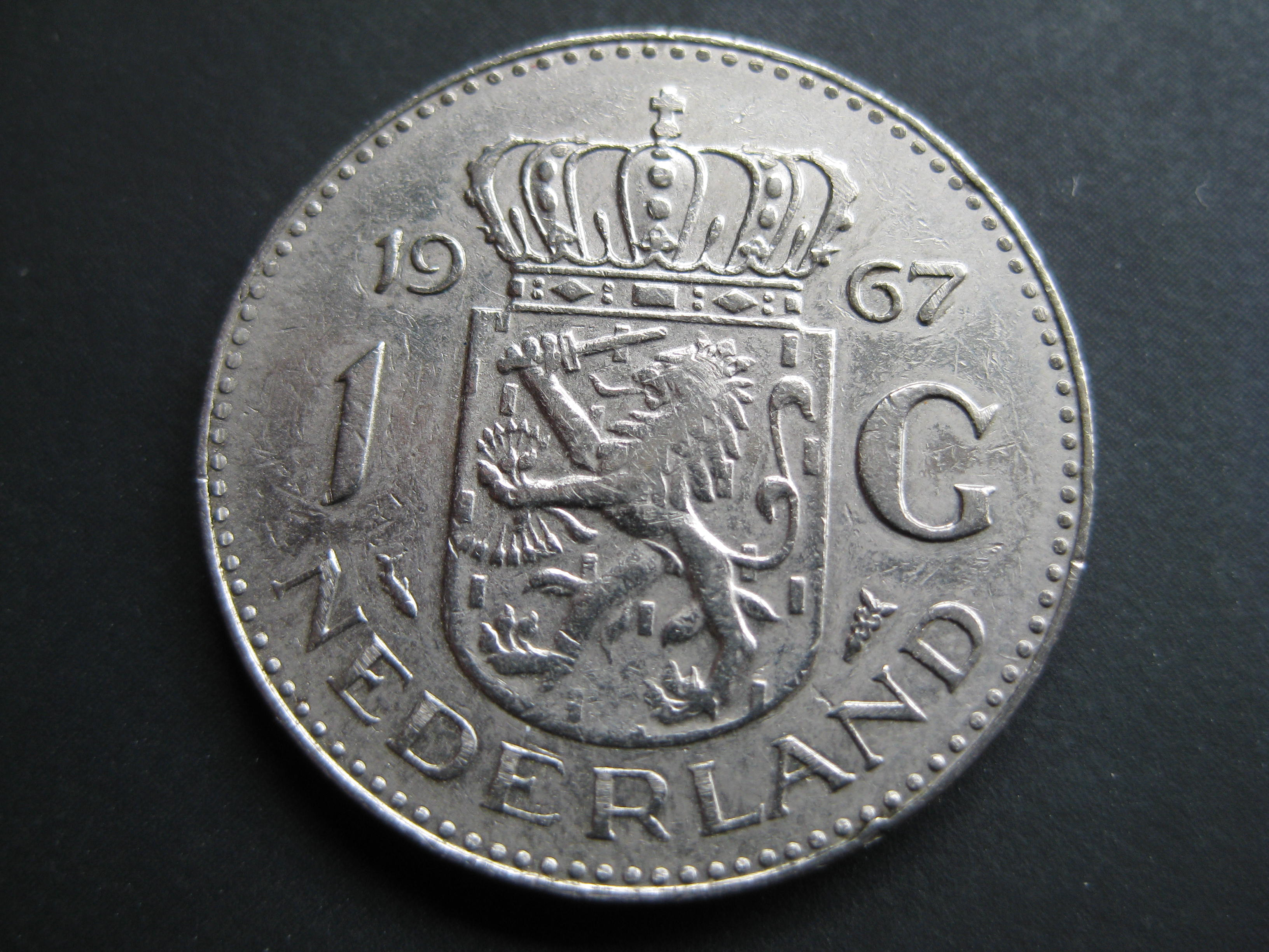 Nederlandse gulden uit 1967, voorkant, meesterteken vis van muntmeester Dr.J.W.A. van Hengel, nikkel